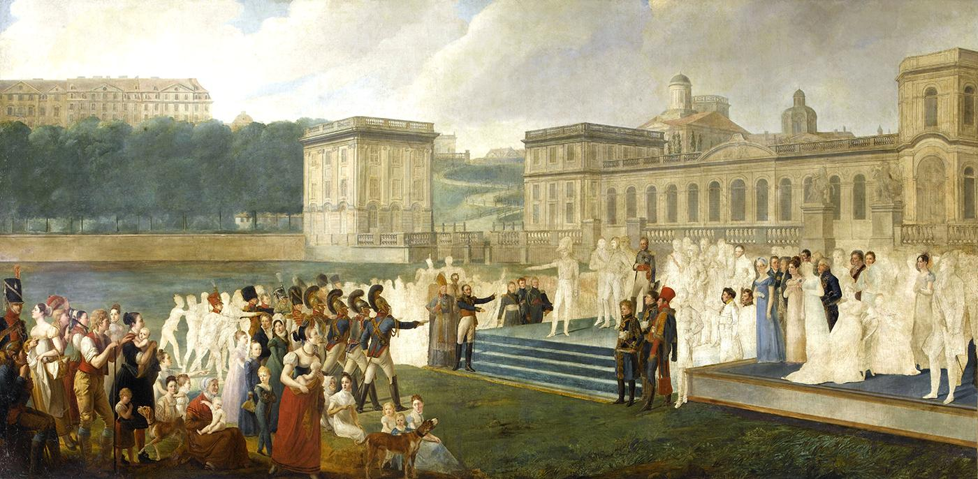 Serment au drapeau westphalien,La Westphalie était certes une monarchie constitutionnelle, mais l’essentiel du pouvoir restait entre les mains du roi. Comme le royaume faisait partie de la confédération du Rhin, son armée était surtout destinée à renforcer la Grande Armée commandée par Napoléon. Le royaume constituait donc un État satellite de l’Empire français et s’effondra dès la défaite de Napoléon à Leipzig en 1813. La statue de Bosio ne rejoignit jamais Kassel, n’ayant pu être envoyée en Westphalie avant la chute du royaume. Elle était peut-être destinée à orner la salle des États de Kassel, le premier hémicycle parlementaire allemand, construit par l’architecte français Grandjean de Montigny dans le Museum Fridericianum. Quant au tableau, il demeura inachevé : grâce à Jérôme, Dupré effectua dès le début de l’année 1812 un séjour à Rome pour parfaire son apprentissage et ne revint jamais en Westphalie. - See more at